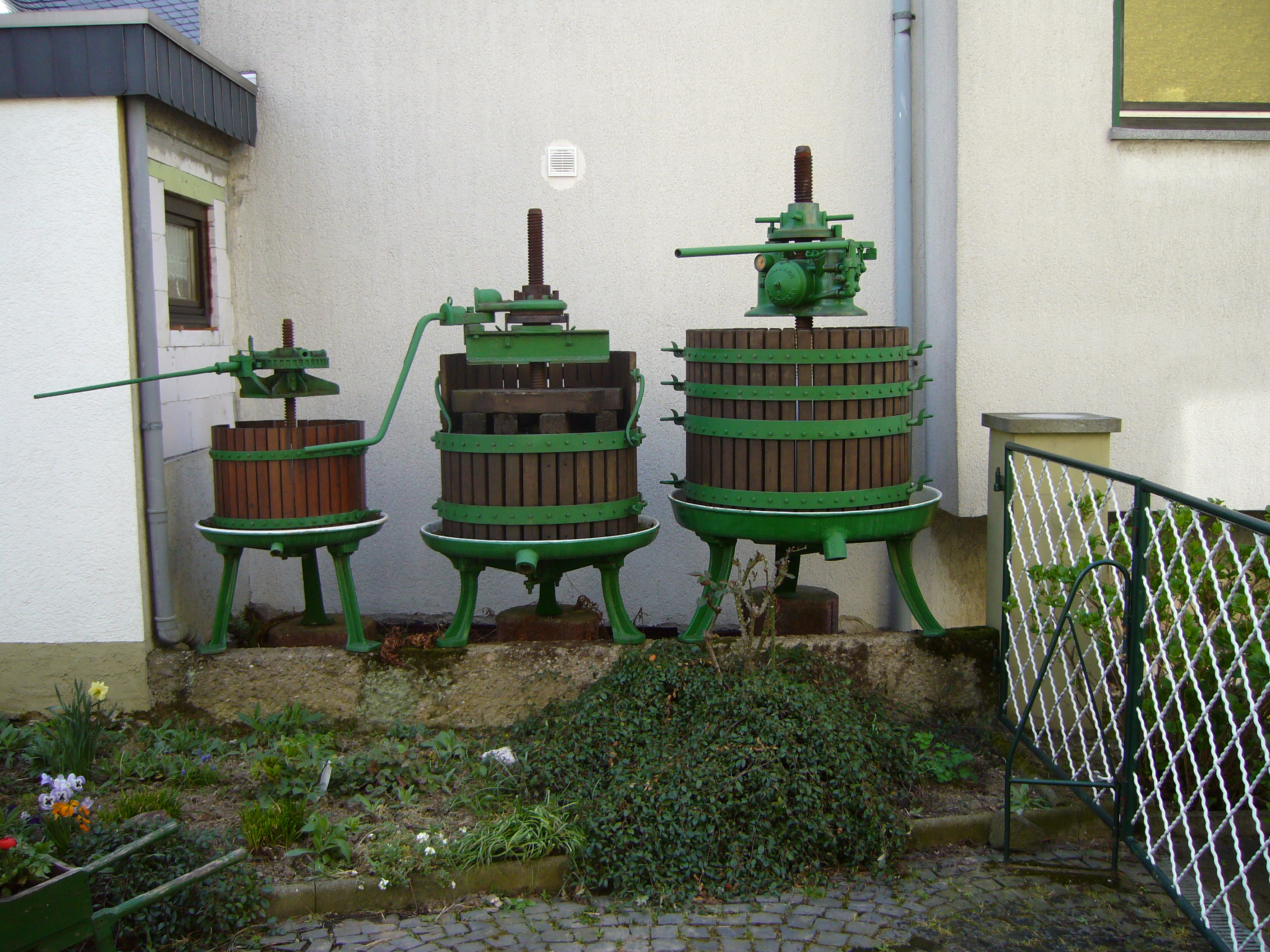 Dorfmuseum, Leutesdorf